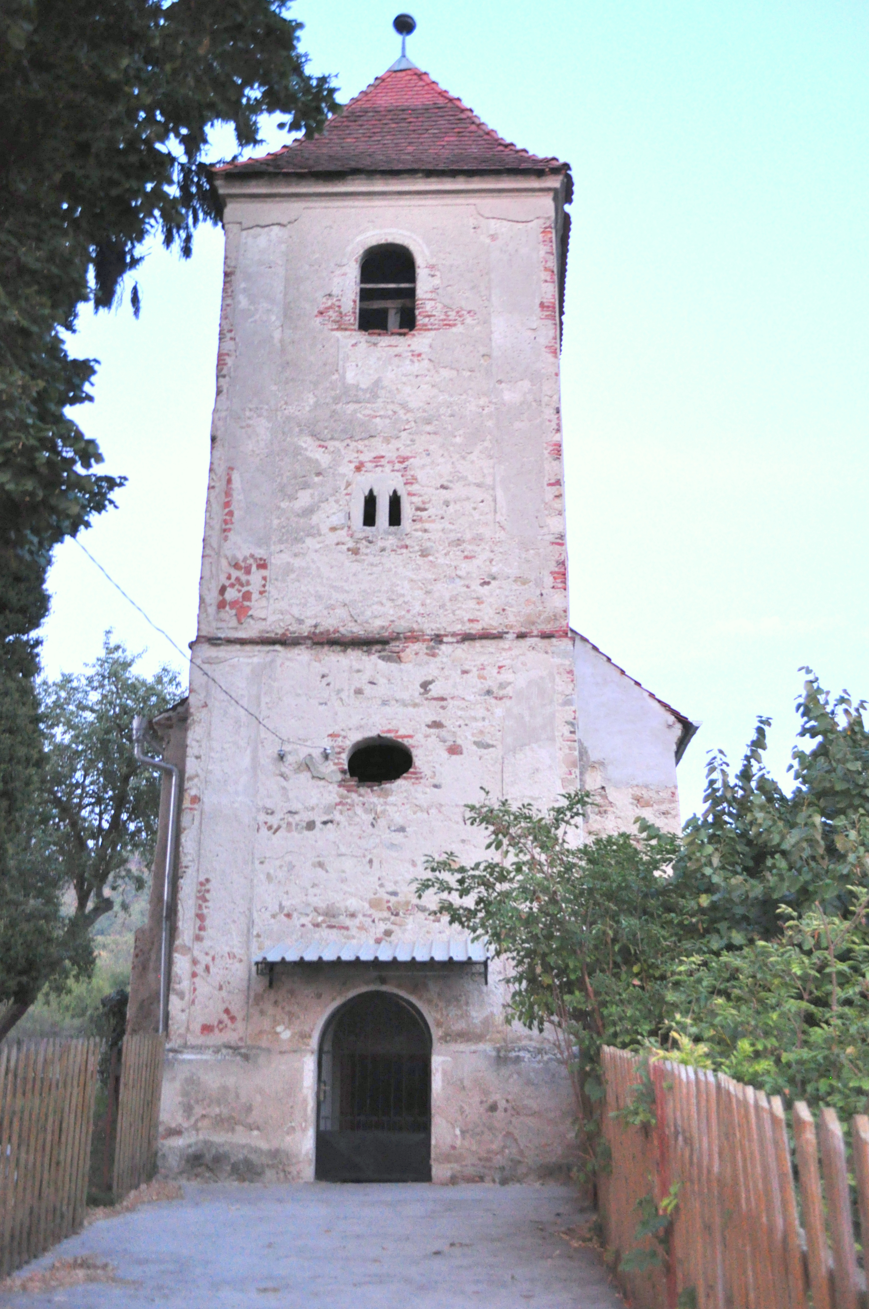 Biserica evanghelică din Pianu de Jos, județul Alba 01